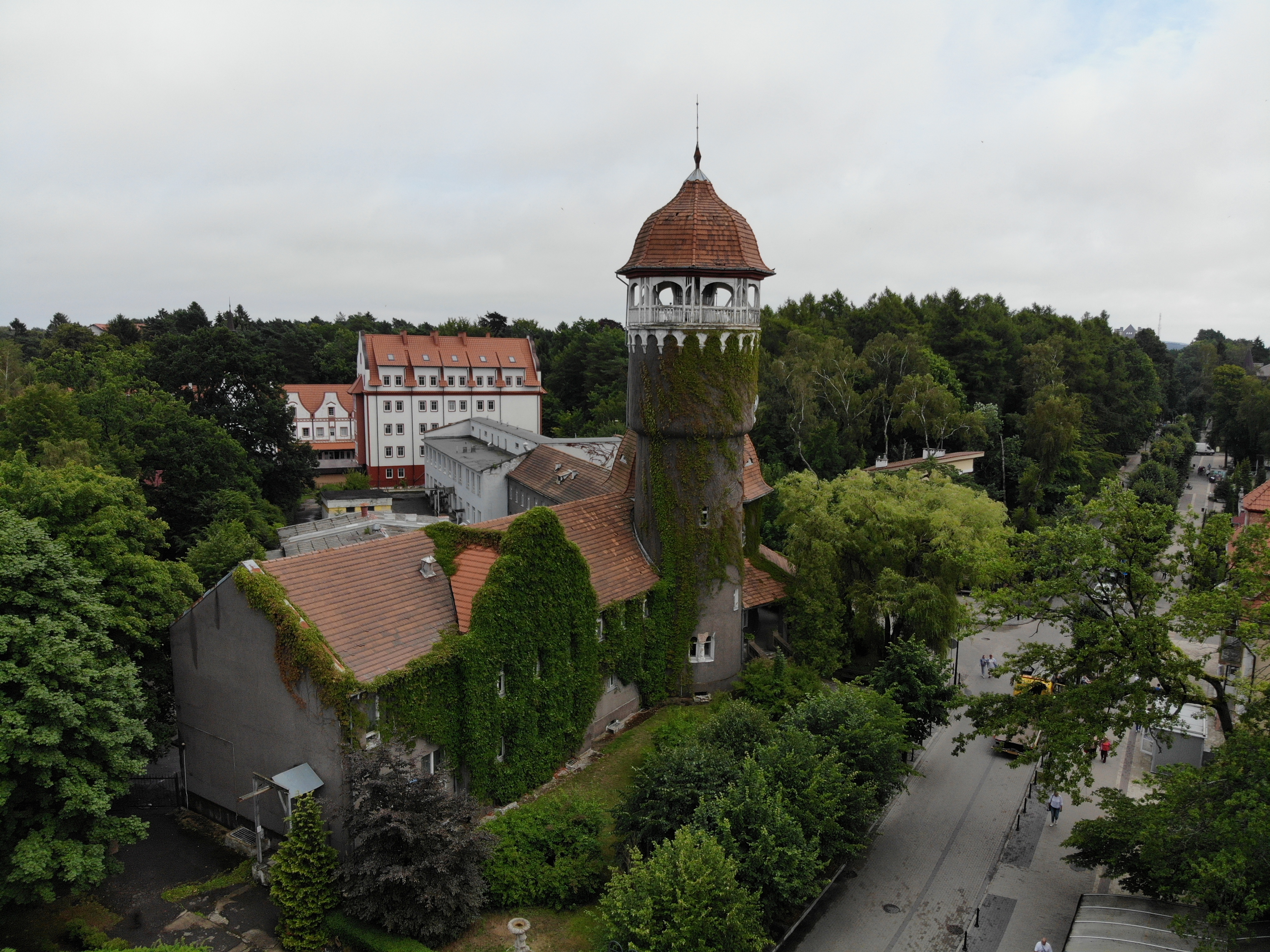 Здание санатория (водогрязелечебницы с водонапорной башей): улица Октябрьская, 11, Светлогорск, Светлогорский район, Калининградская область